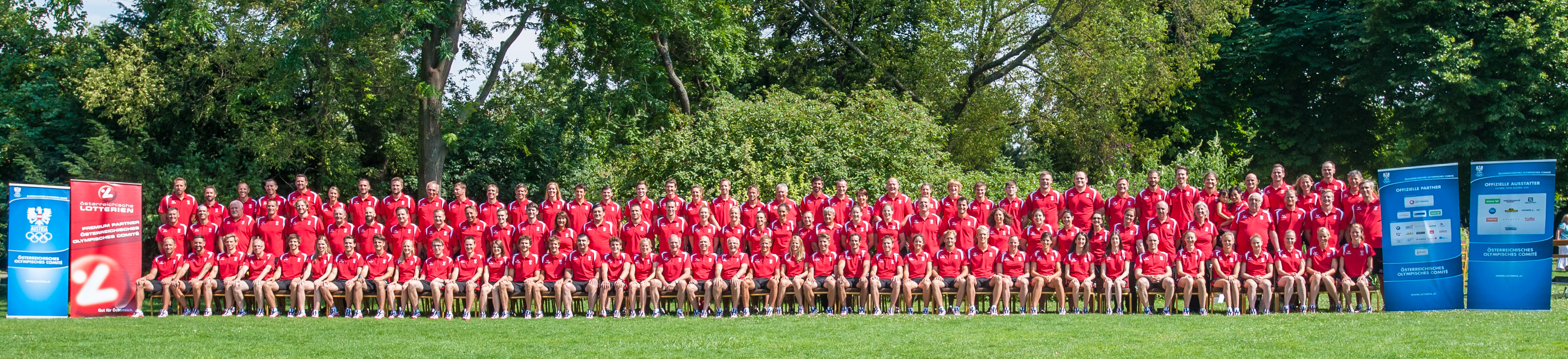 Einkleidung der Österreichischen Teilnehmer an den Olympischen Sommerspielen 2016 am 16./17. Juli 2016 in Wien. Bild zeigt das Österreichische Olympiateam.